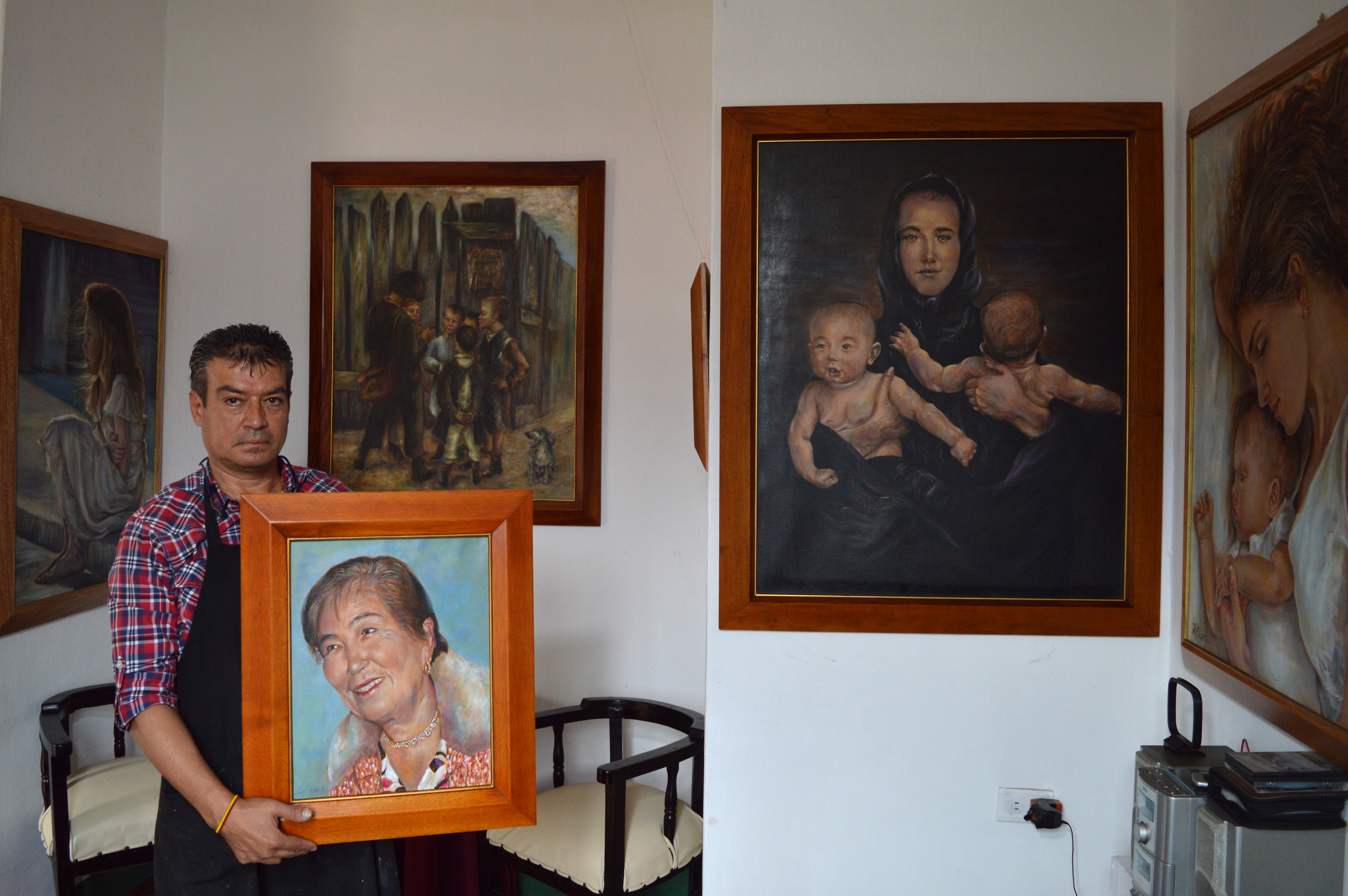 Dorian Flórez Con algunas de sus obras, En sus manos un retrato de su madre. (Fotografía por Mateo Echeverri Flórez)